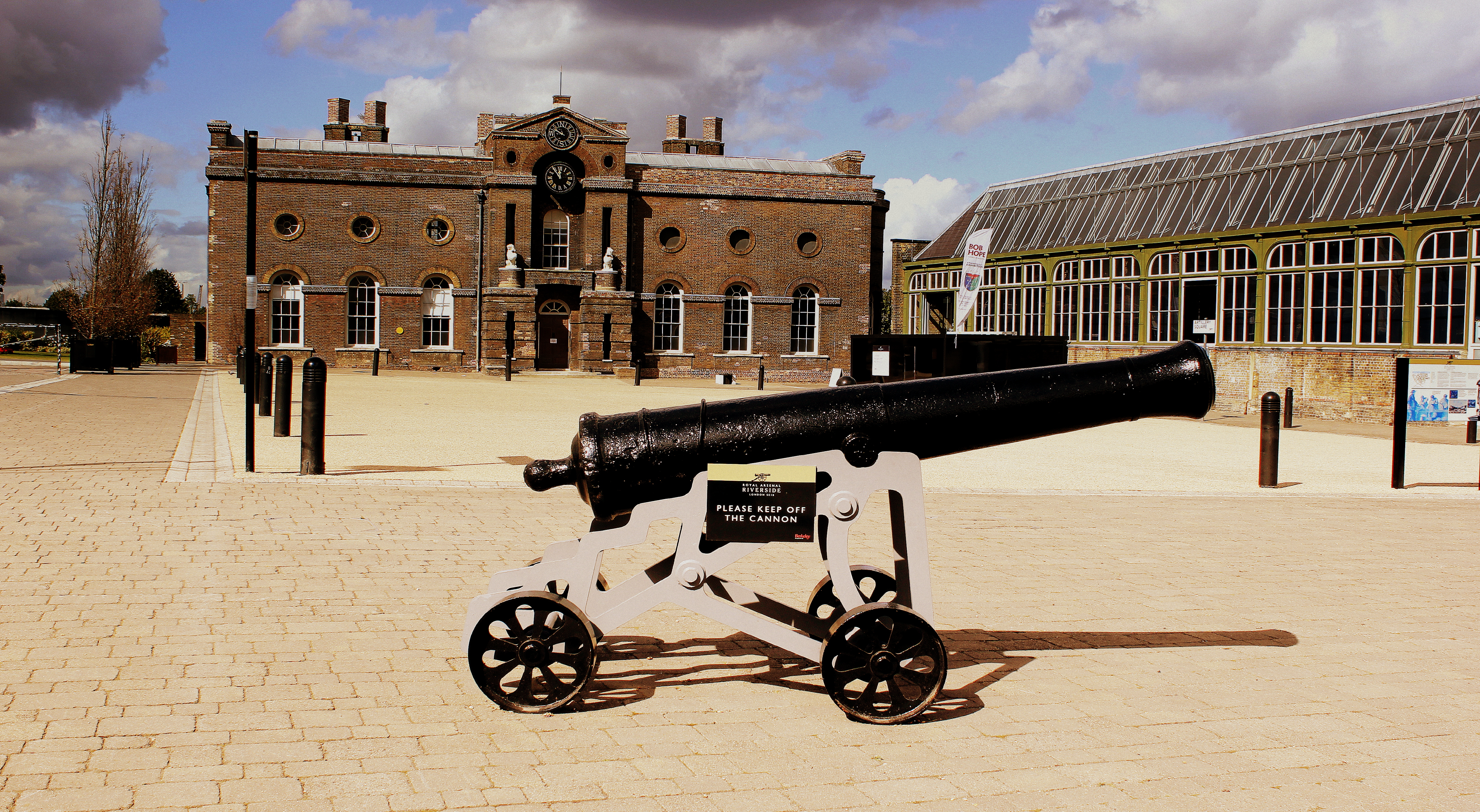 WOOLWICH ARSENAL WOOLWICH LONDON SEP 2012